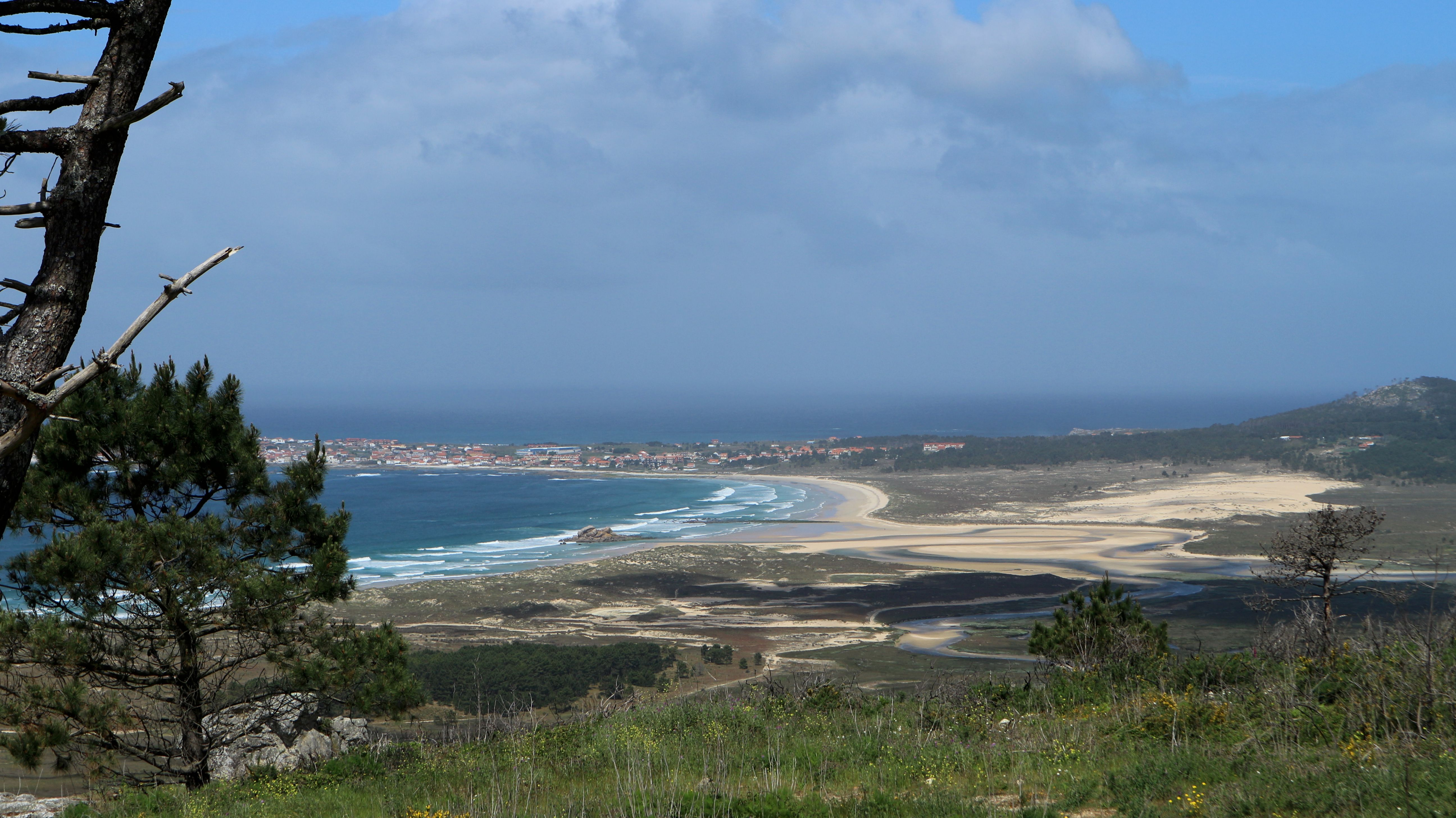 Vistas de Ribeira desde o mirador da Pedra da Rá. Carreira, Ribeira, A Coruña.